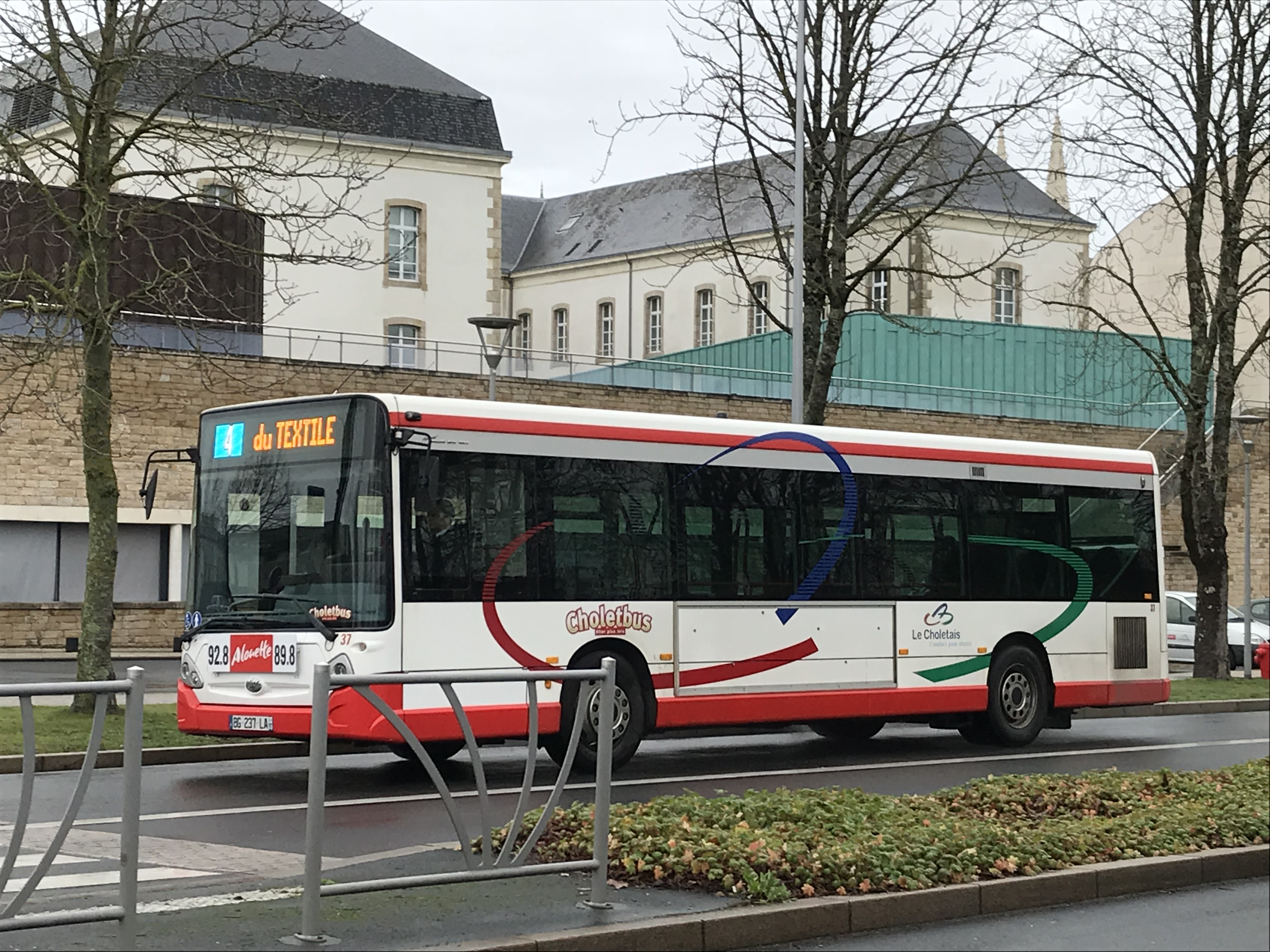 un bus de la ligne 4 du réseau Choletbus